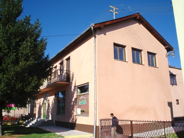 Jagodnjak Municipal Building